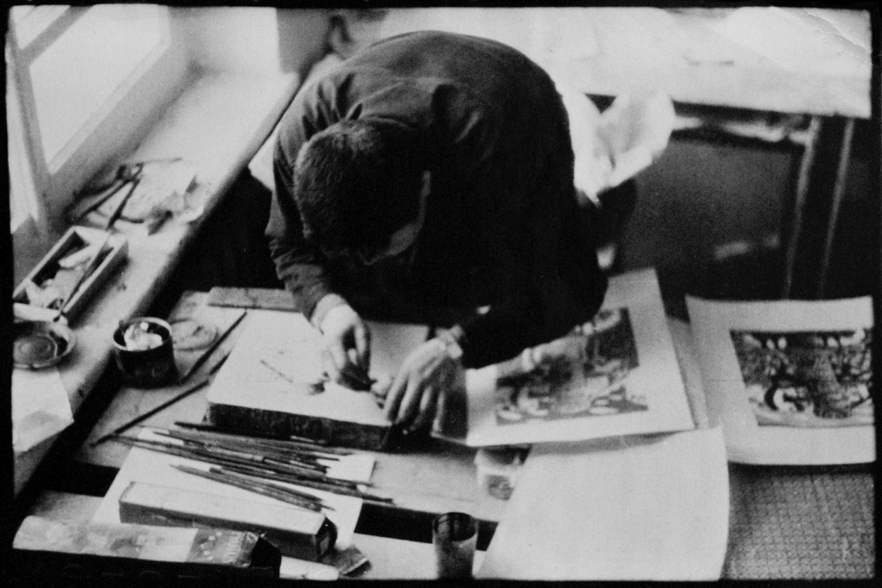 Чингис Ногайбаев за работой